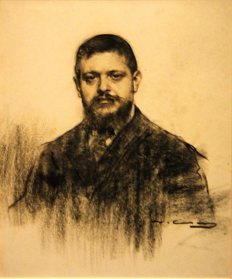 Retrat de Jaume Carner i Romeu, obra de Ramon Casas.